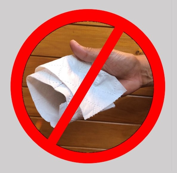 Uso NO ecológico del papel higiénico en la mala práctica de arrollarselo en la mano, con lo cual se desperdicia la mitad y se provoca la tala innecesaria de 70.000 árboles (2019) con un alto daño ambiental.